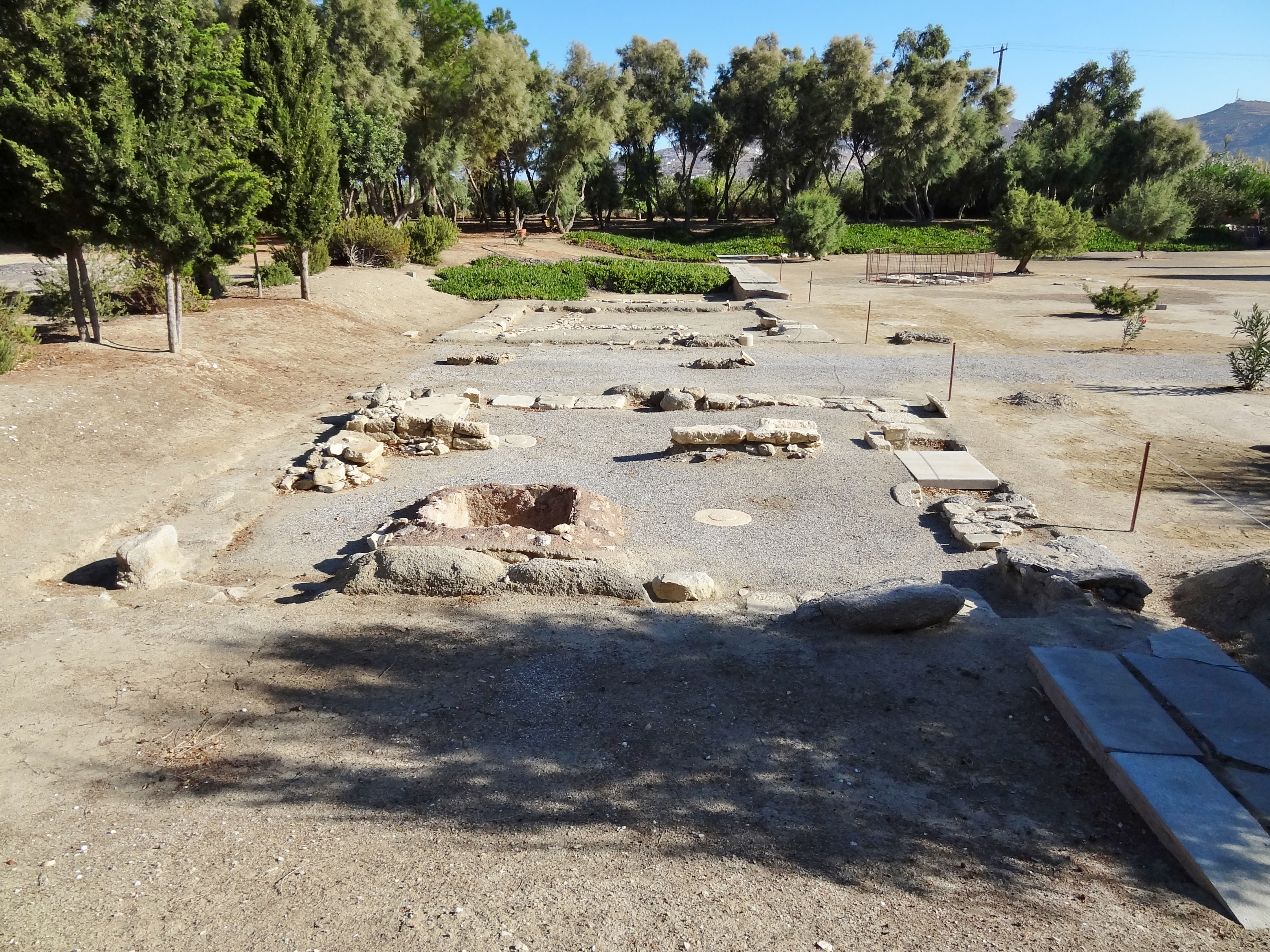 Festsaal (Hestiatorion) und Propylon auf dem Gelände des Tempels des Dionysos von Yria auf Naxos, Kykladen, Griechenland